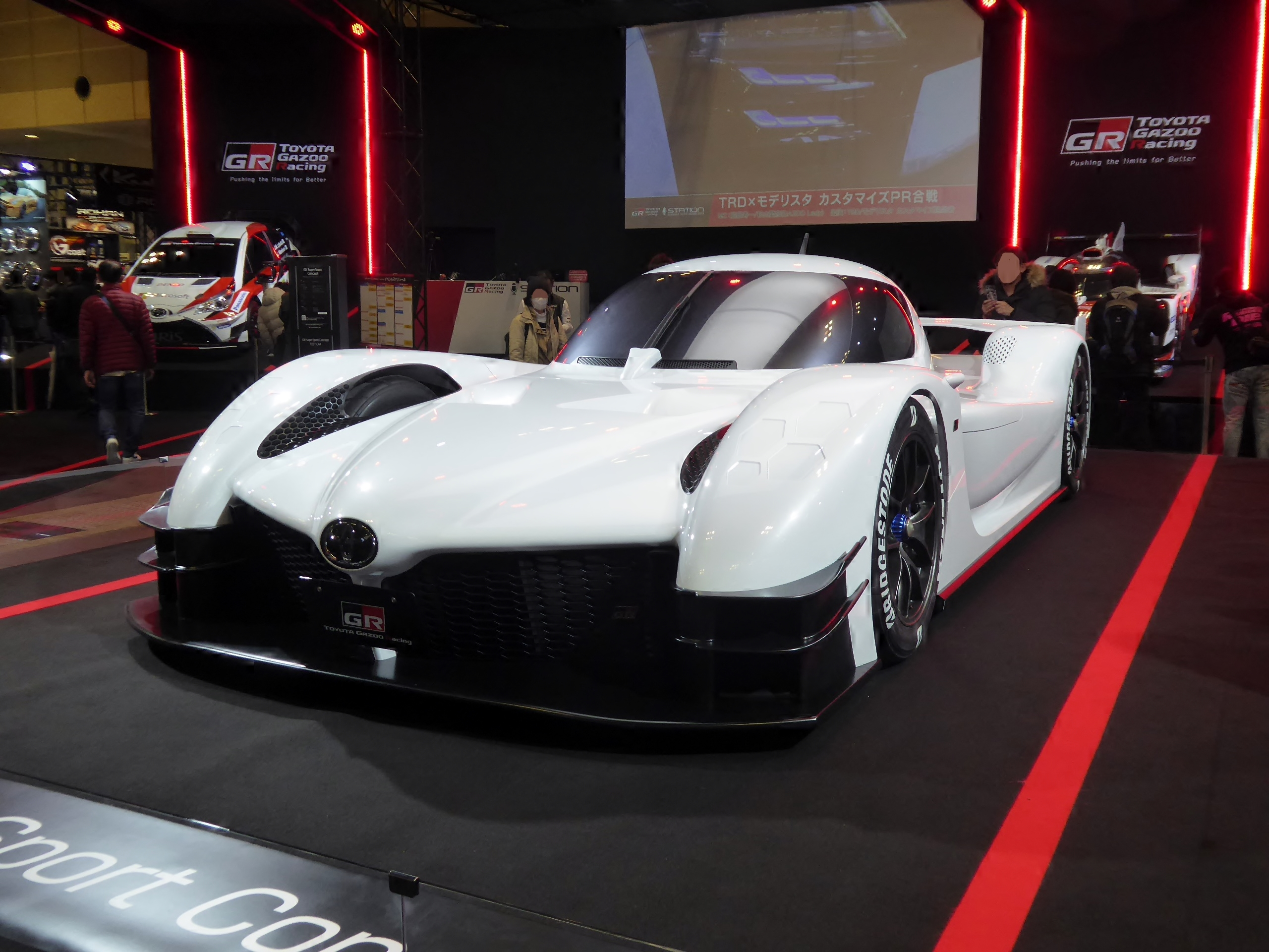 大阪オートメッセ2018に於いてトヨタ・GRスーパースポーツコンセプトを撮影。